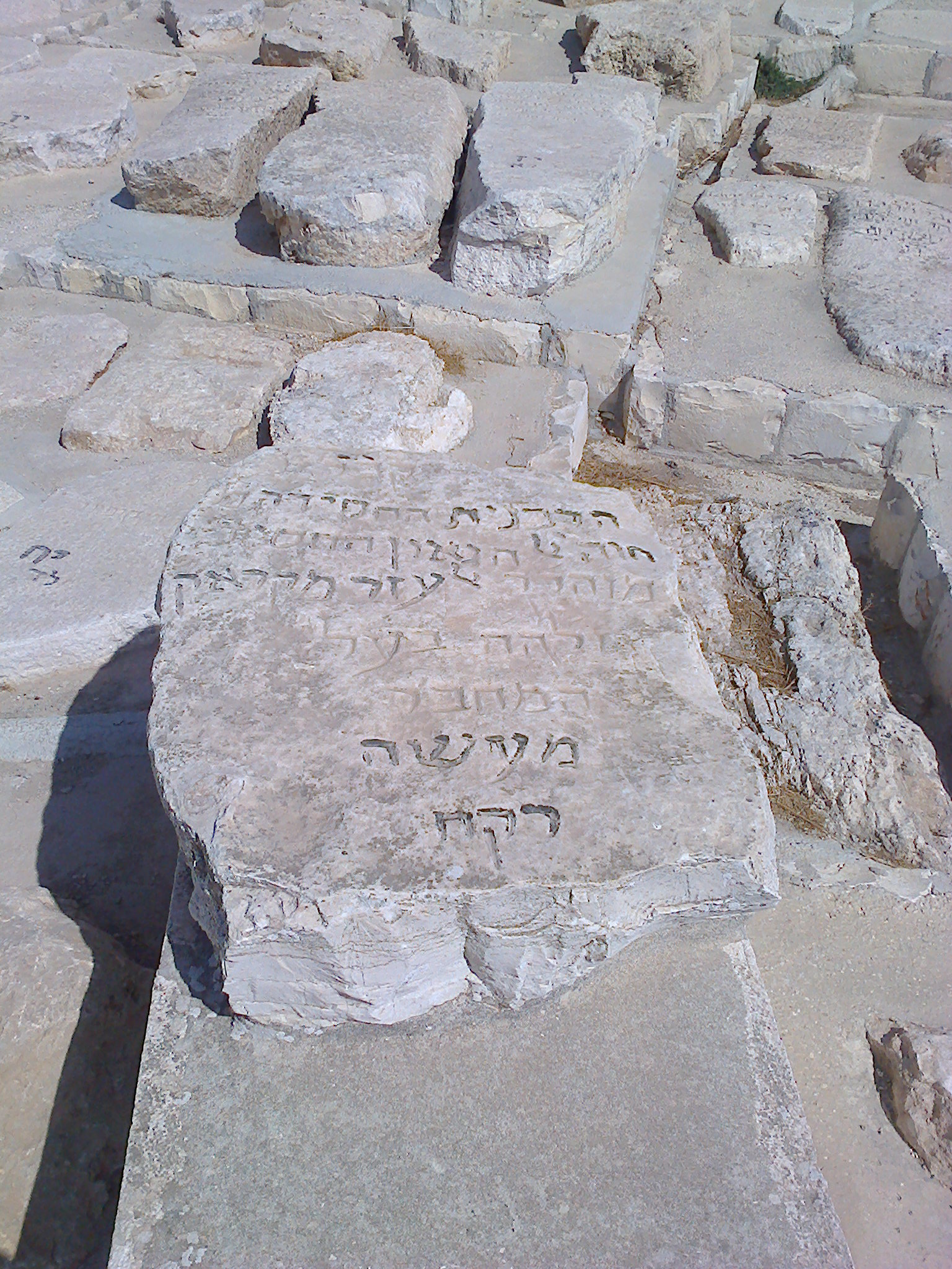 ציון הרבנית מ' חוה רוקח בהר הזיתים